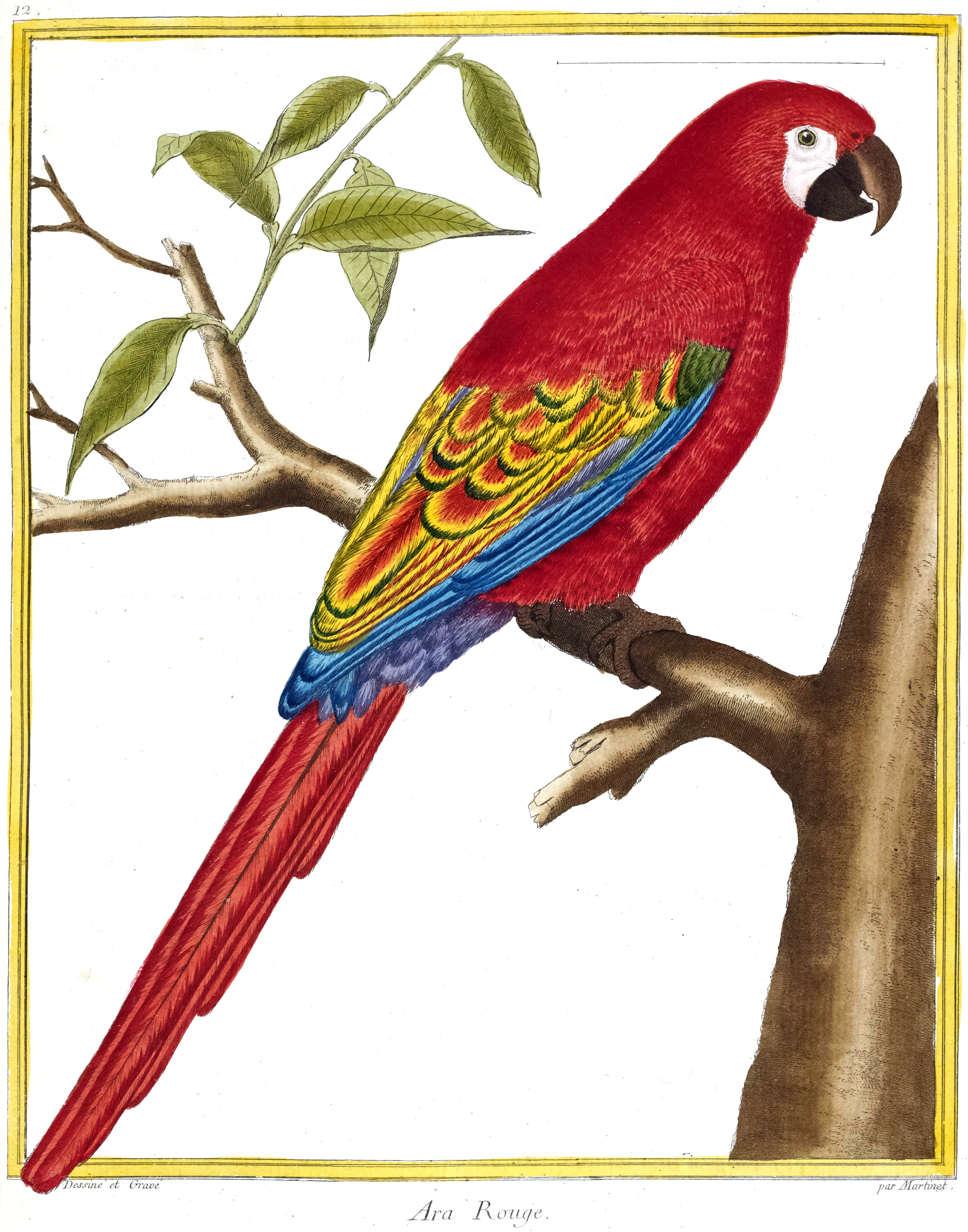 Plate from Buffon’s Planches Enluminées, pl.12.